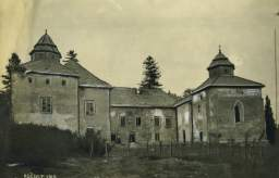 20ст.